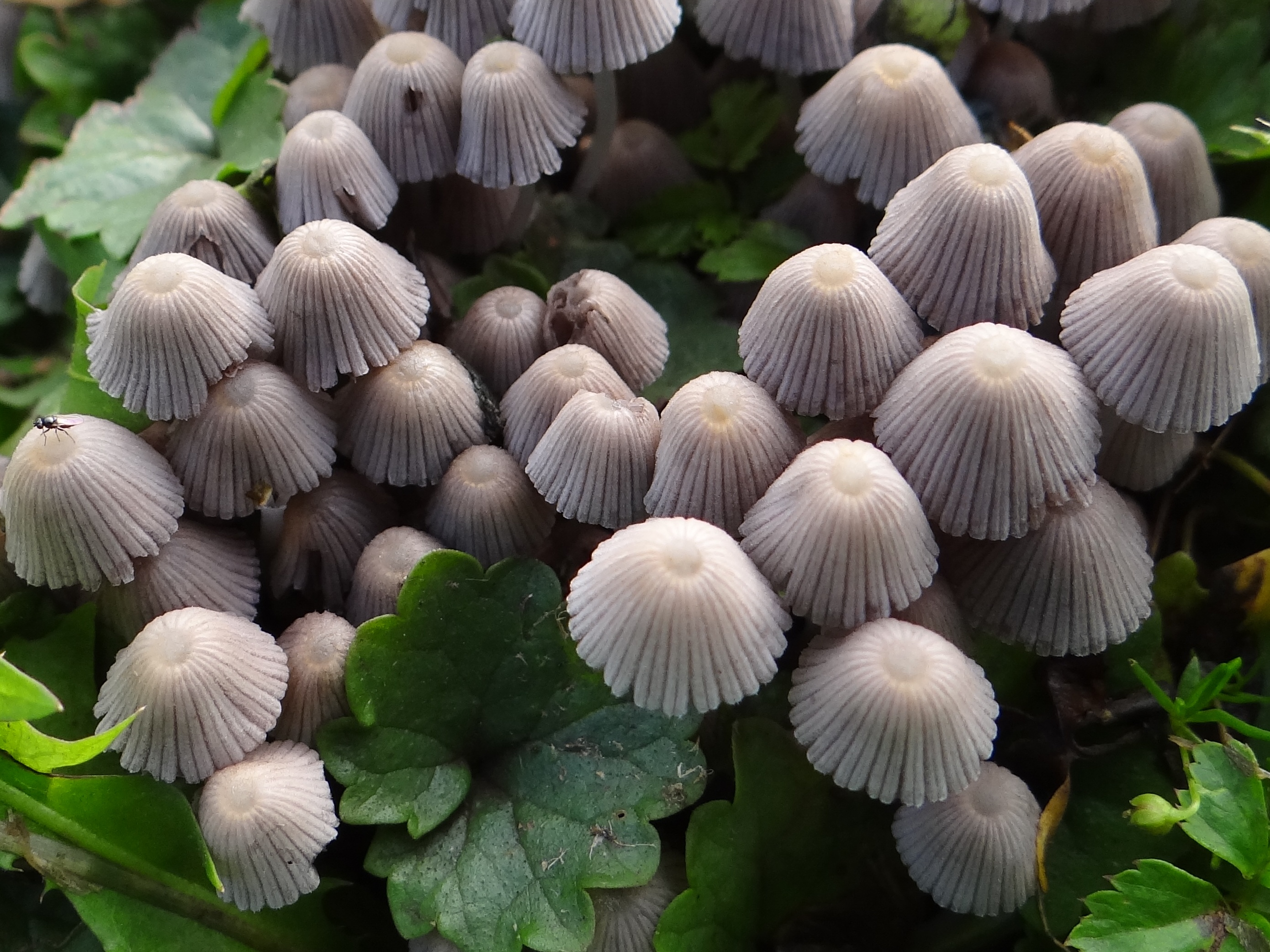 Coprinellus disseminatus